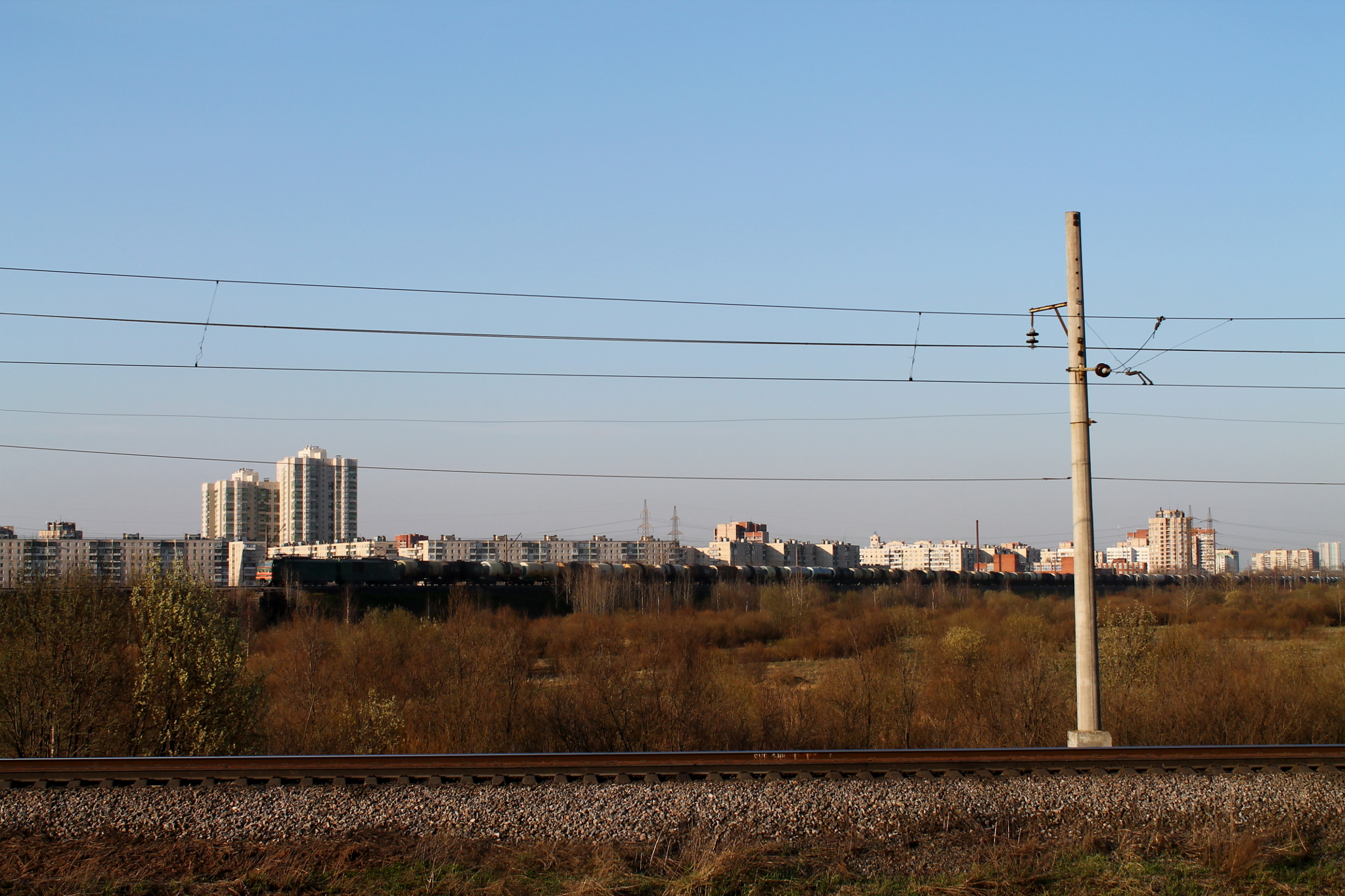 Шушары - Купчинская. см. фото 502246 в альбоме автора